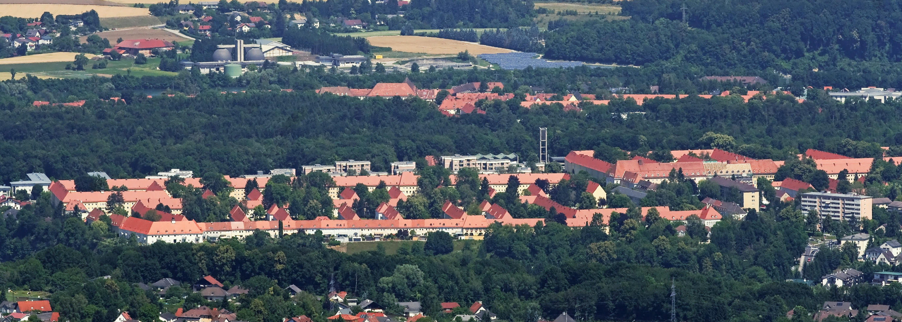 Blick von der Dambergwarte auf den Steyrer Stadtteil Münichholz